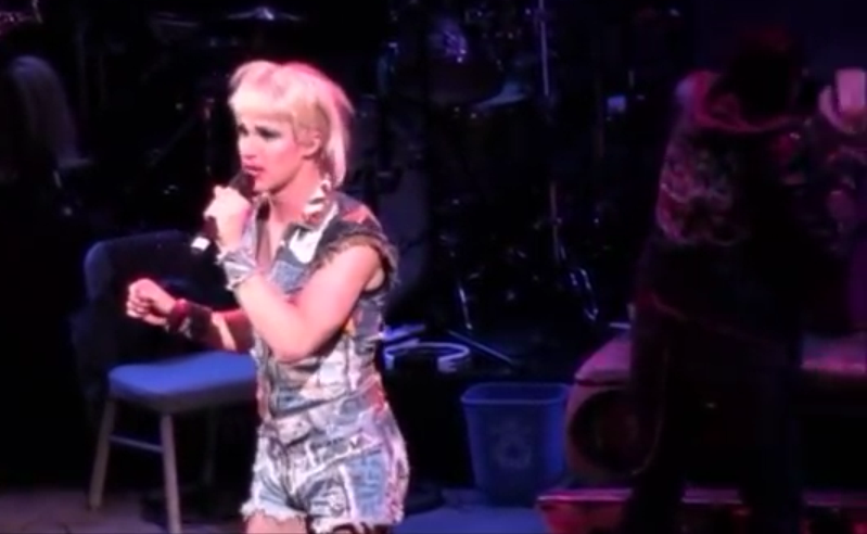 תמונה מתוך ההופעה של דארן כריס בתחיית הברודווי בשנת 2015 למחזמר "Hedwig And The Angry Inch" כשהוא שר את השיר "Wig In a Box"